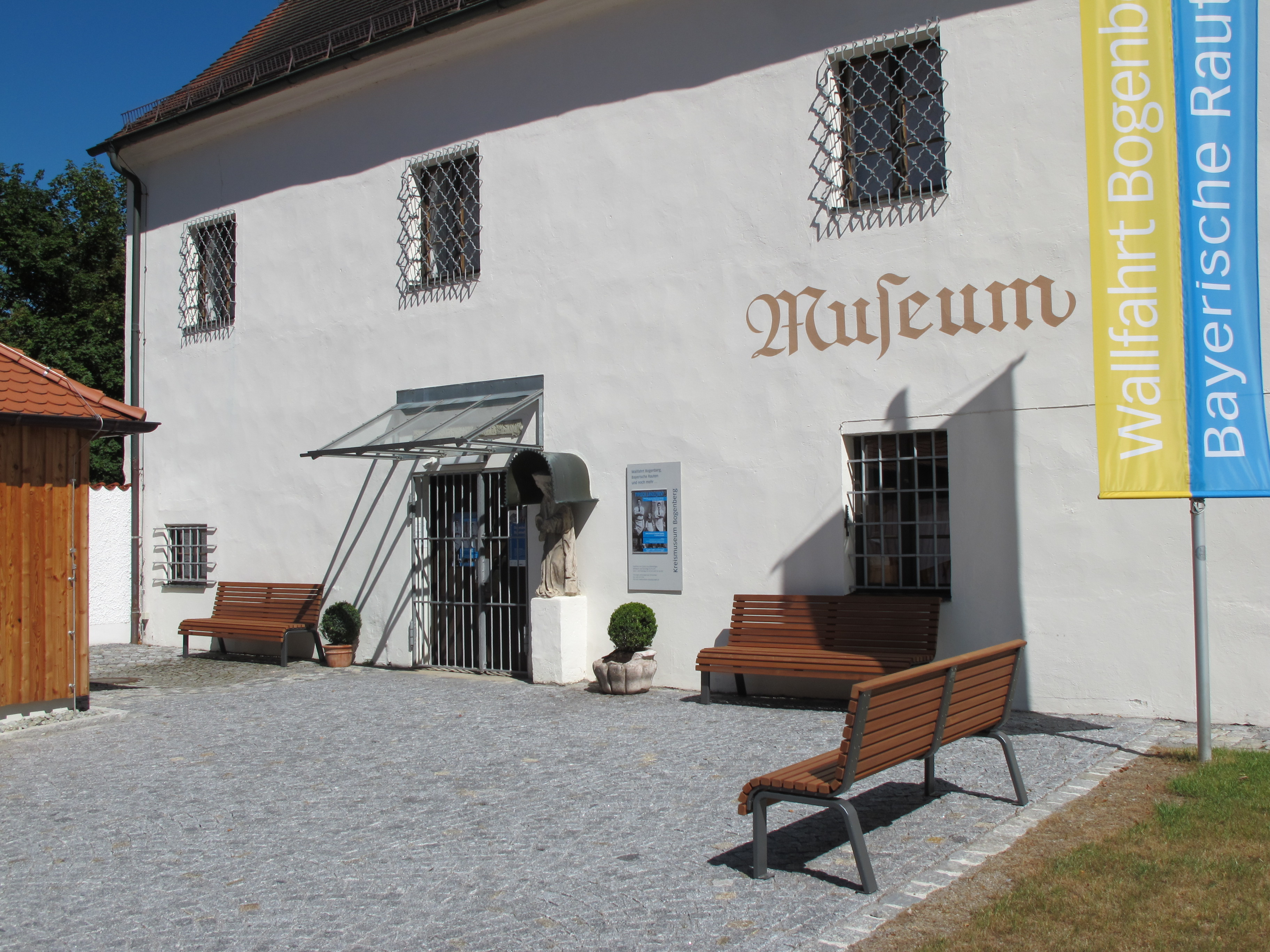 Der Eingangsbereich des Kreismuseums Bogenberg im ehemaligen Pfarrstadel am Bogenberggipfel.